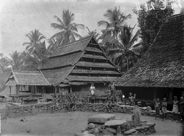 Foto. Dorpsplein te Noea Lolo met graven van lokale bestuurders